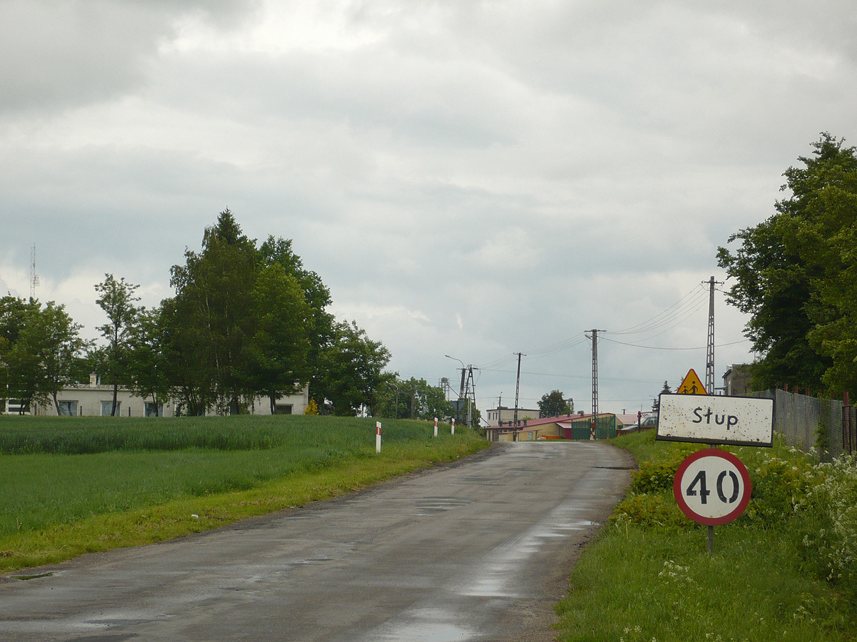 Droga prowadząca do wsi.